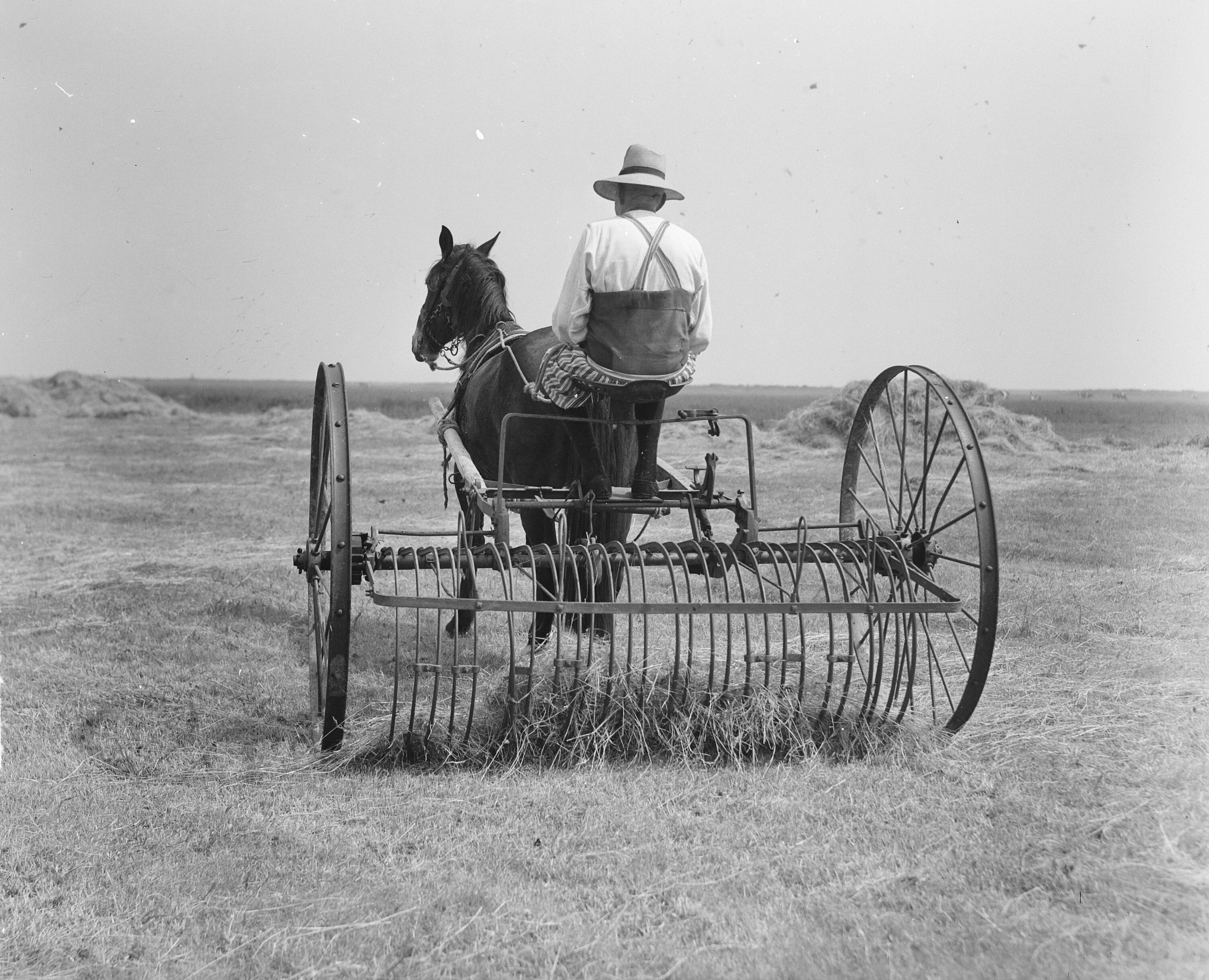 Collectie / Archief : Fotocollectie Anefo Reportage / Serie : [ onbekend ] Beschrijving : Hooien op Marke Datum : 7 juni 1950 Trefwoorden : HOOIEN Fotograaf : Oorschot, […] van / Anefo Auteursrechthebbende : Nationaal Archief Materiaalsoort : Glasnegatief Nummer archiefinventaris : bekijk toegang 2.24.01.09 Bestanddeelnummer : 904-0044